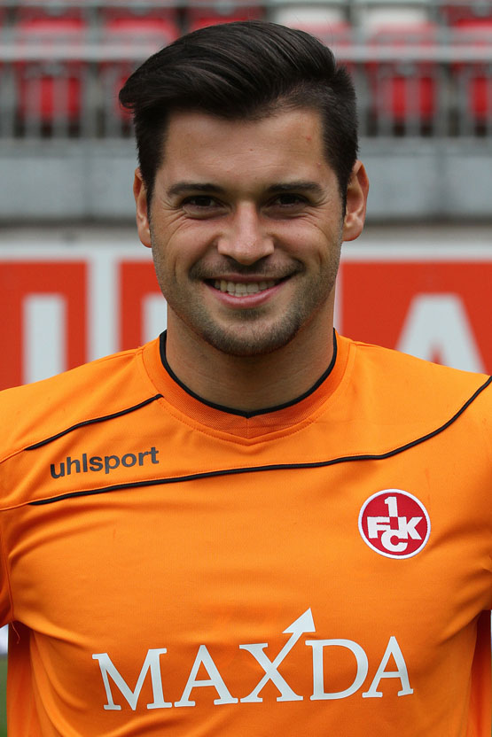 Zlatan Alomerovic